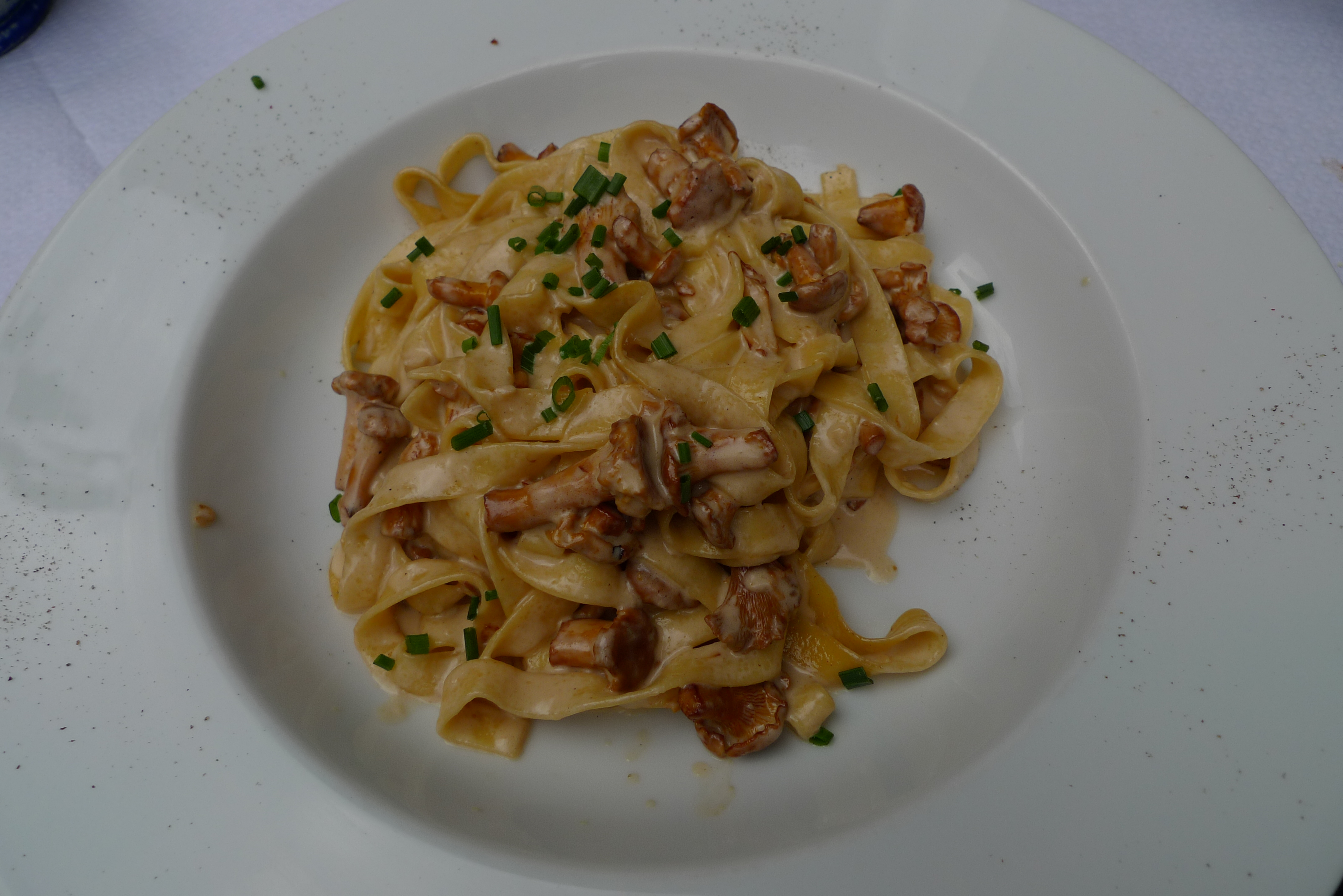 Des tagliatelles aux girolles.